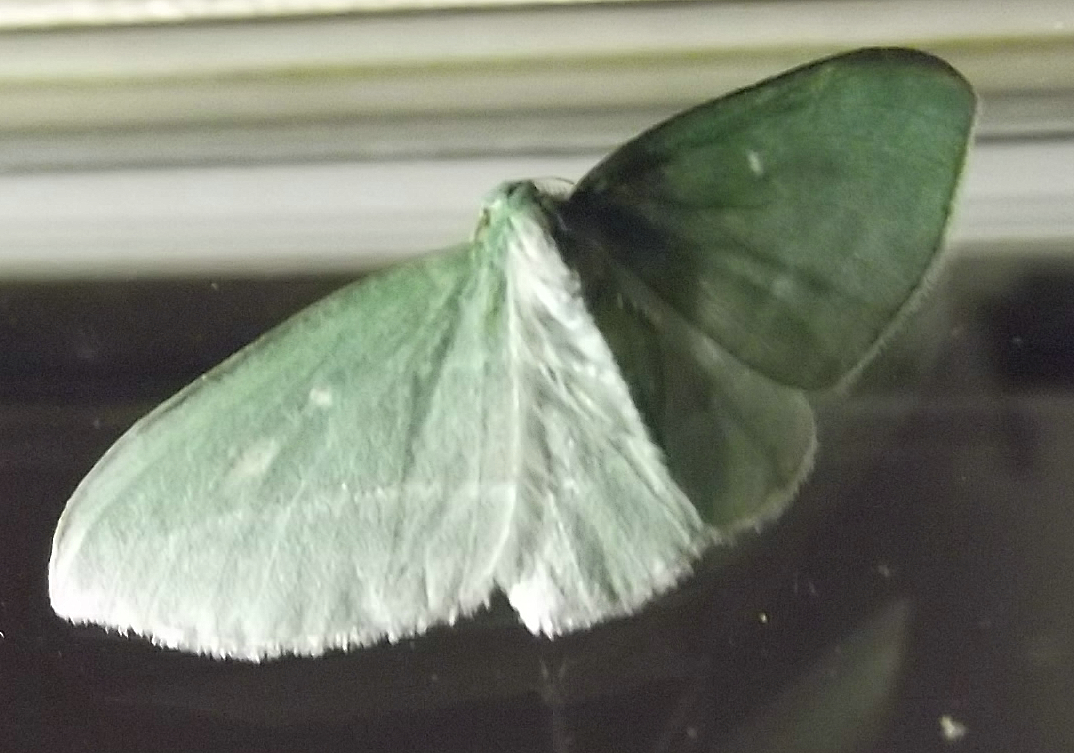 April 24, 2011